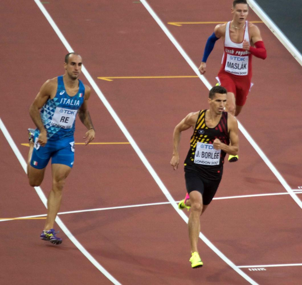 d2_18 jonthan borlée